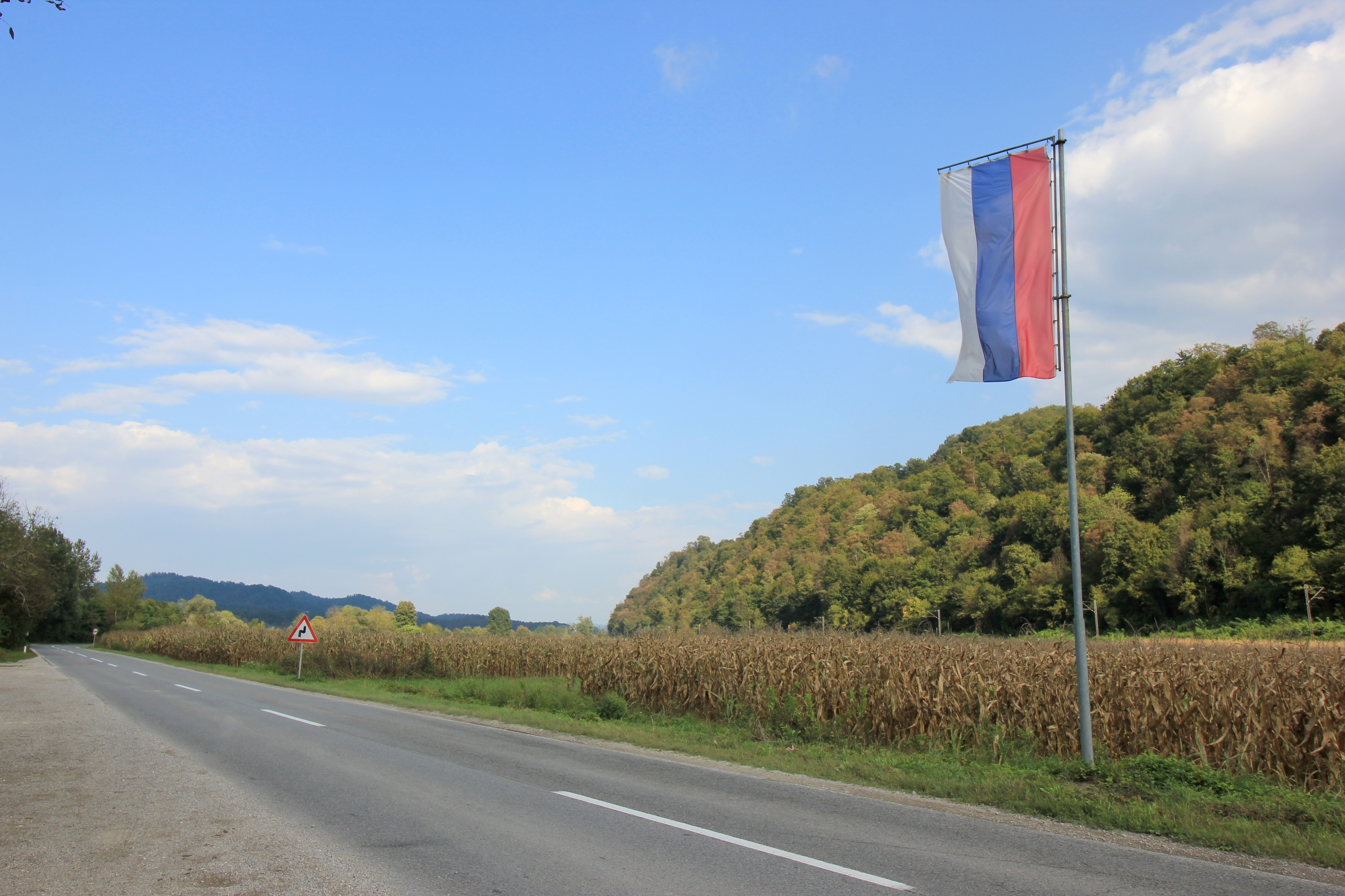 Fernstraße M14 an der Entitätengrenze zwischen Bosanska Otoka und Bosanski Novi.